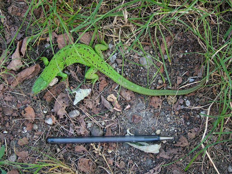 Lacerta viridis femelle